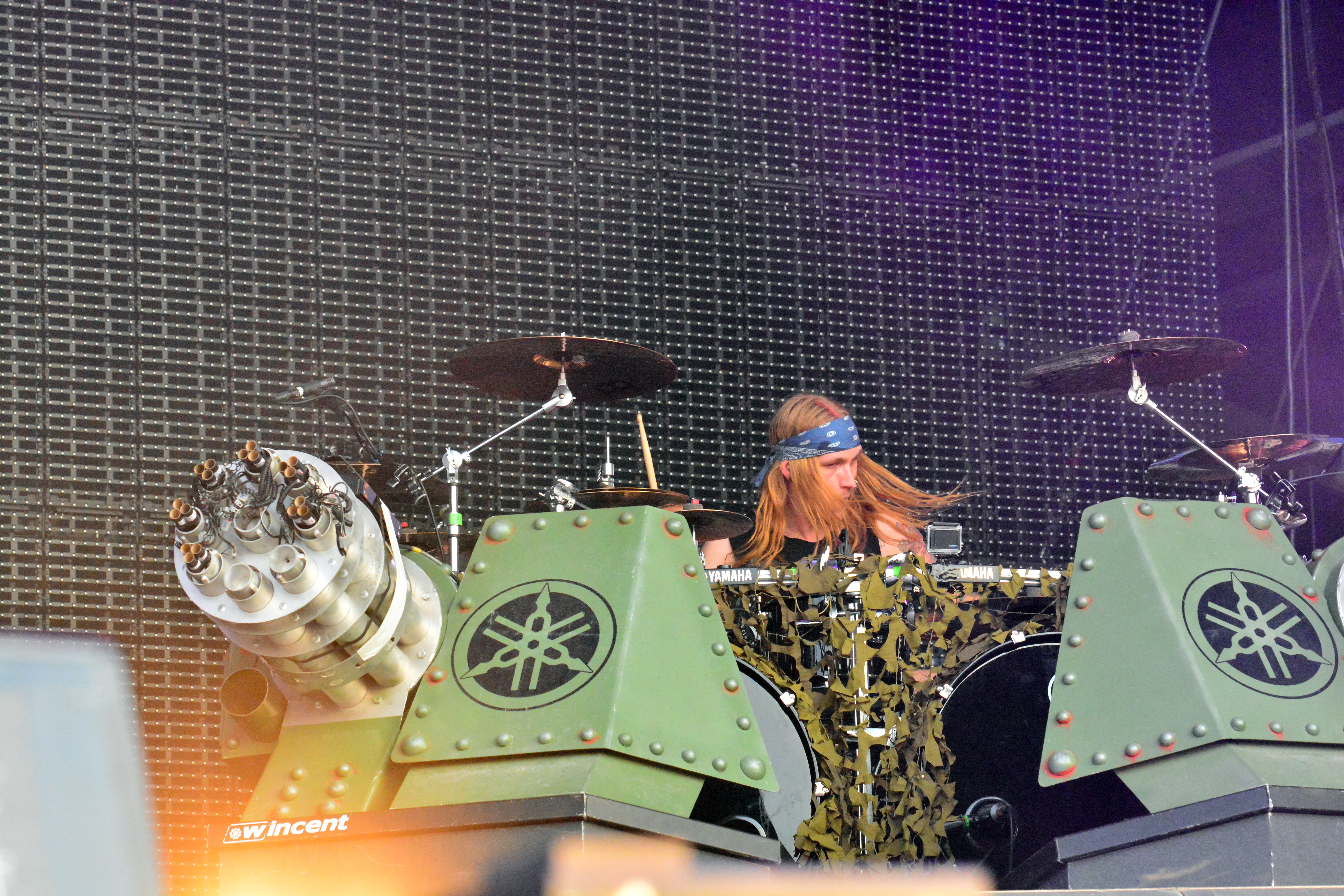 Sabaton beim Wacken Open Air 2015